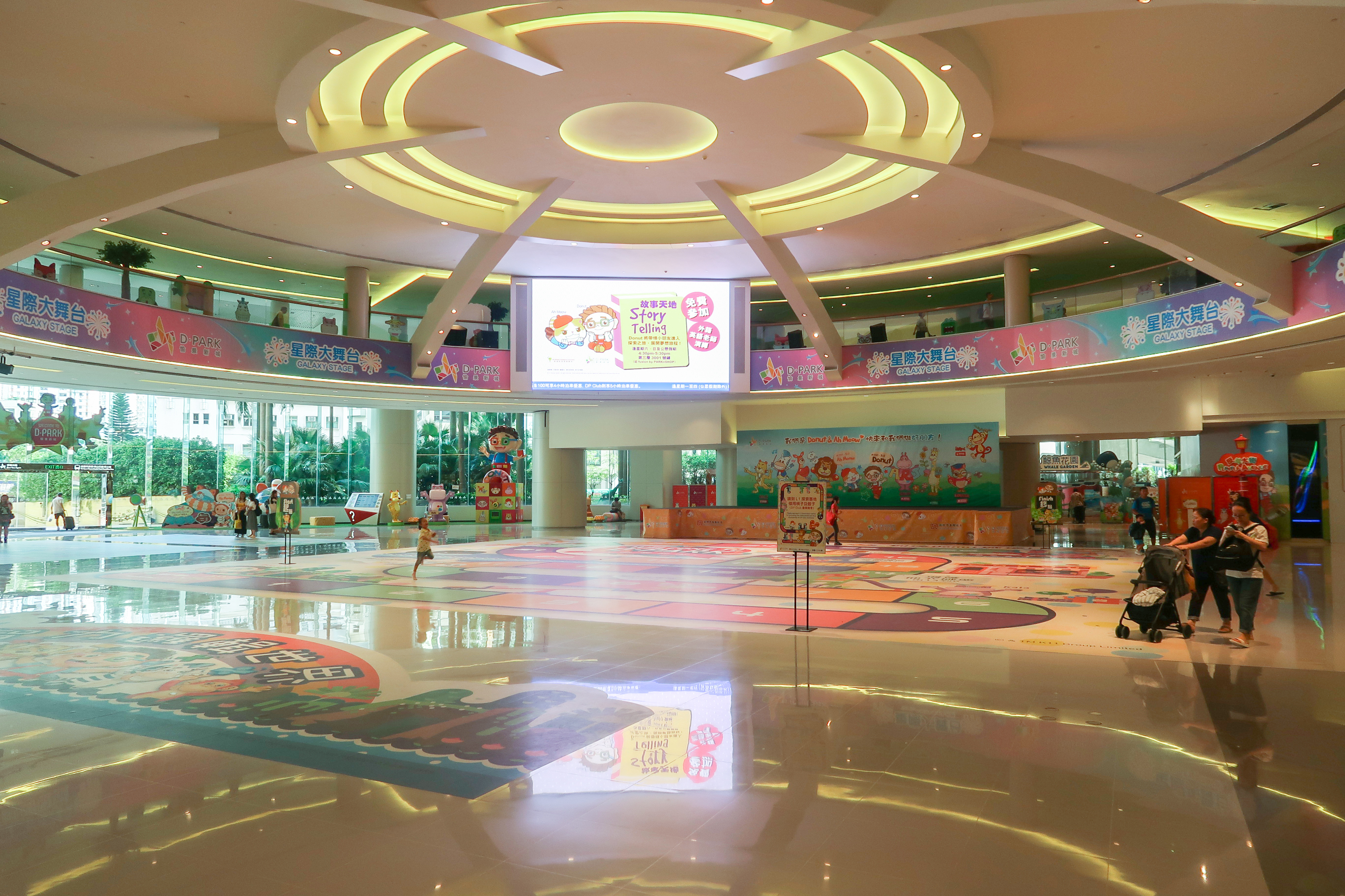 D Park Galaxy Stage